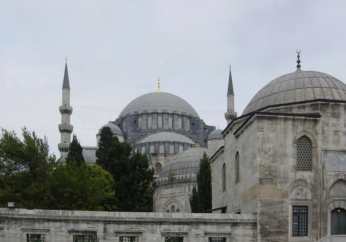 La Moschea di Solimano il Magnifico ad Istanbul vista dall'esterno. Foto di: Giovanni Dall'Orto, 26-5-2006.